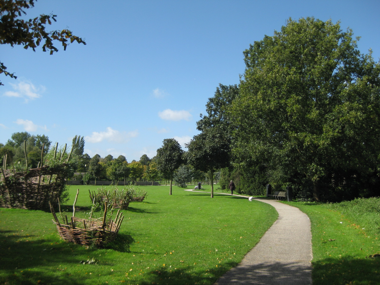 Park Frankendael aan de Middenweg in Amsterdam-Oost